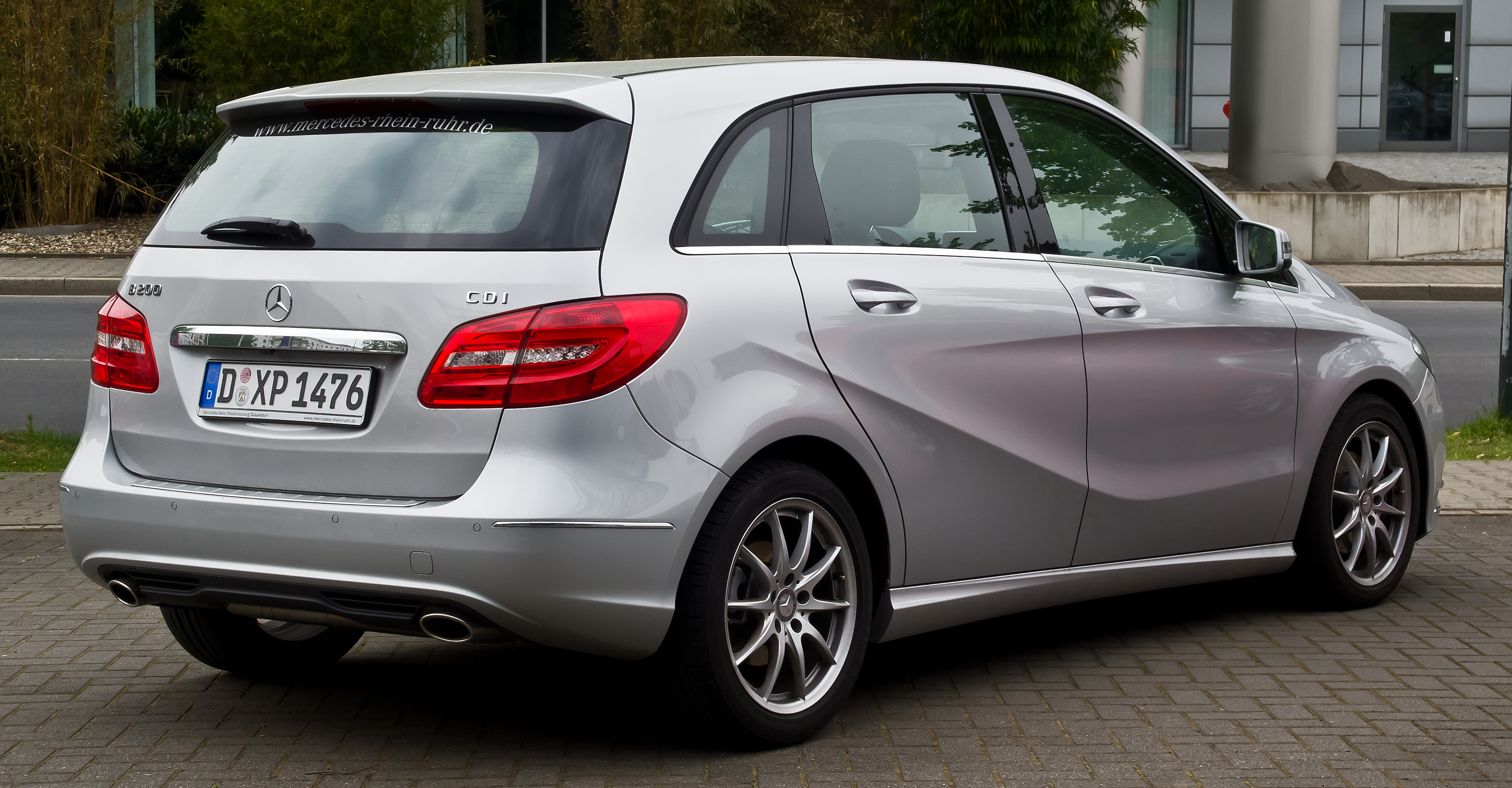 Mercedes-Benz B 200 CDI Sport-Paket (W 246)